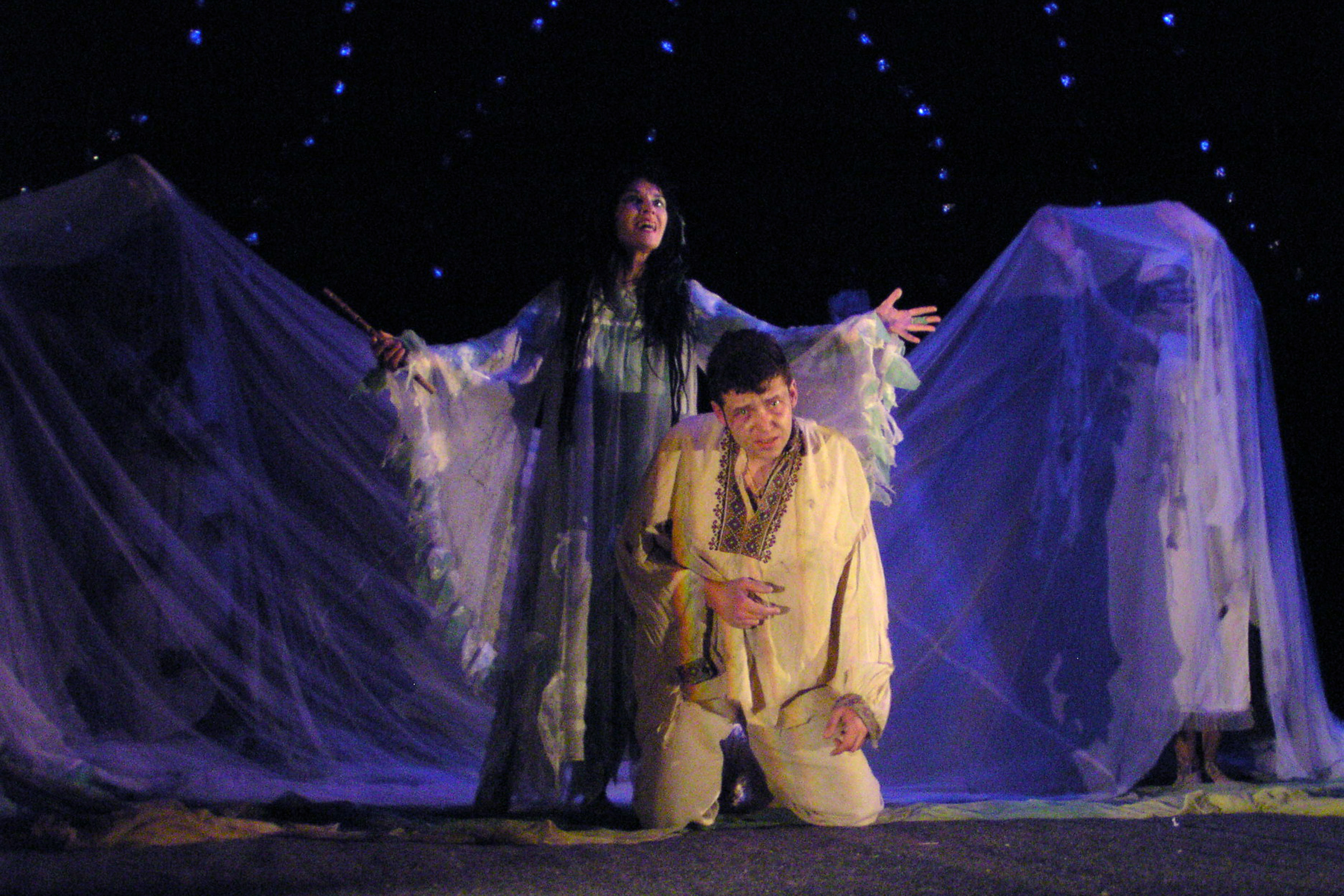 ЛЕСНАЯ ПЕСНЯ. Л. Украинка режиссёр Евгений Тыщук